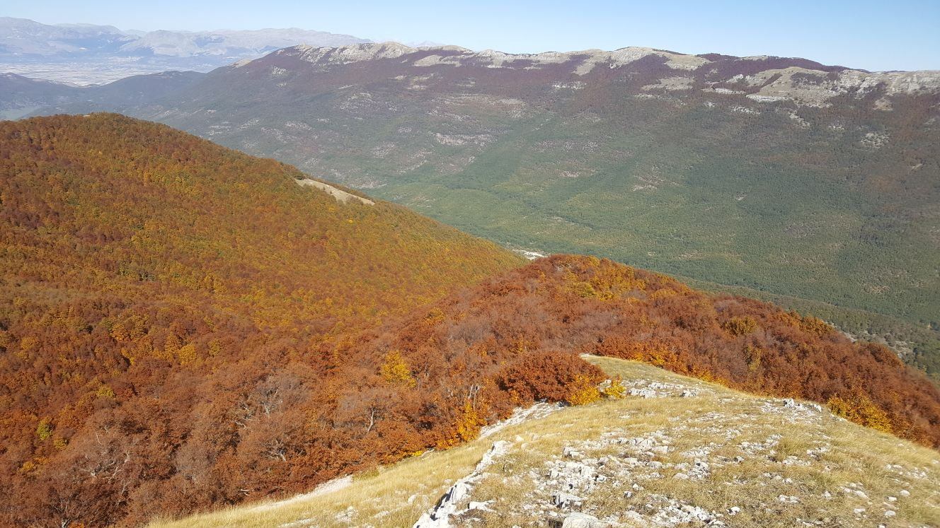 Preappennino abruzzese